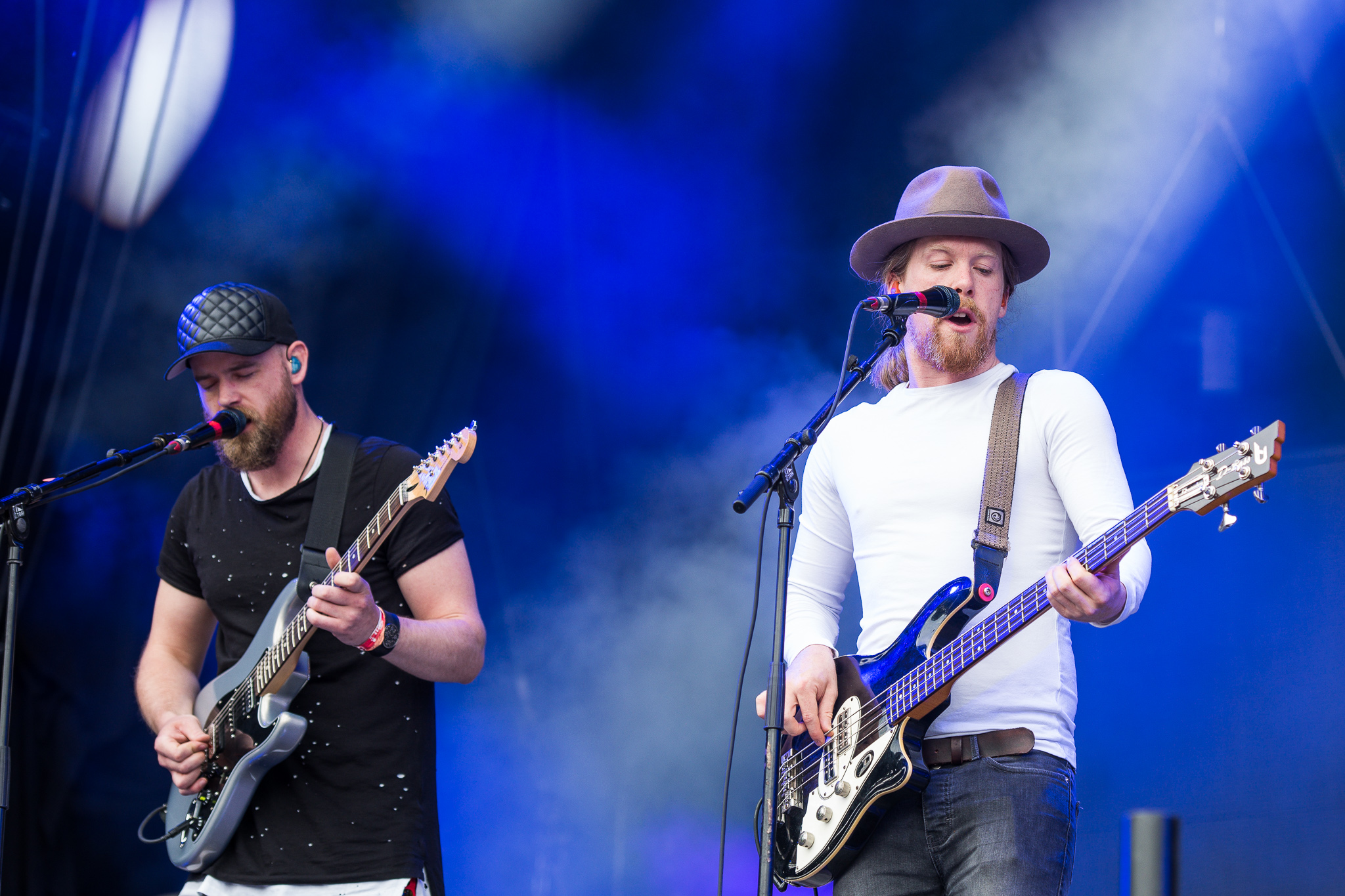 ARGO-Konzerte,Beck's Park Stage,Festival,Konzert,Livekonzert,Livemusik,Musik,RiP,Rock im Park 2016,Walking On Cars